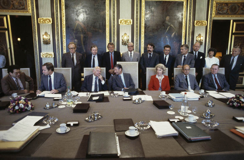 De eerste ministerraadsvergadering van het kabinet-Van Agt II in de Trêveszaal op 11 september 1981